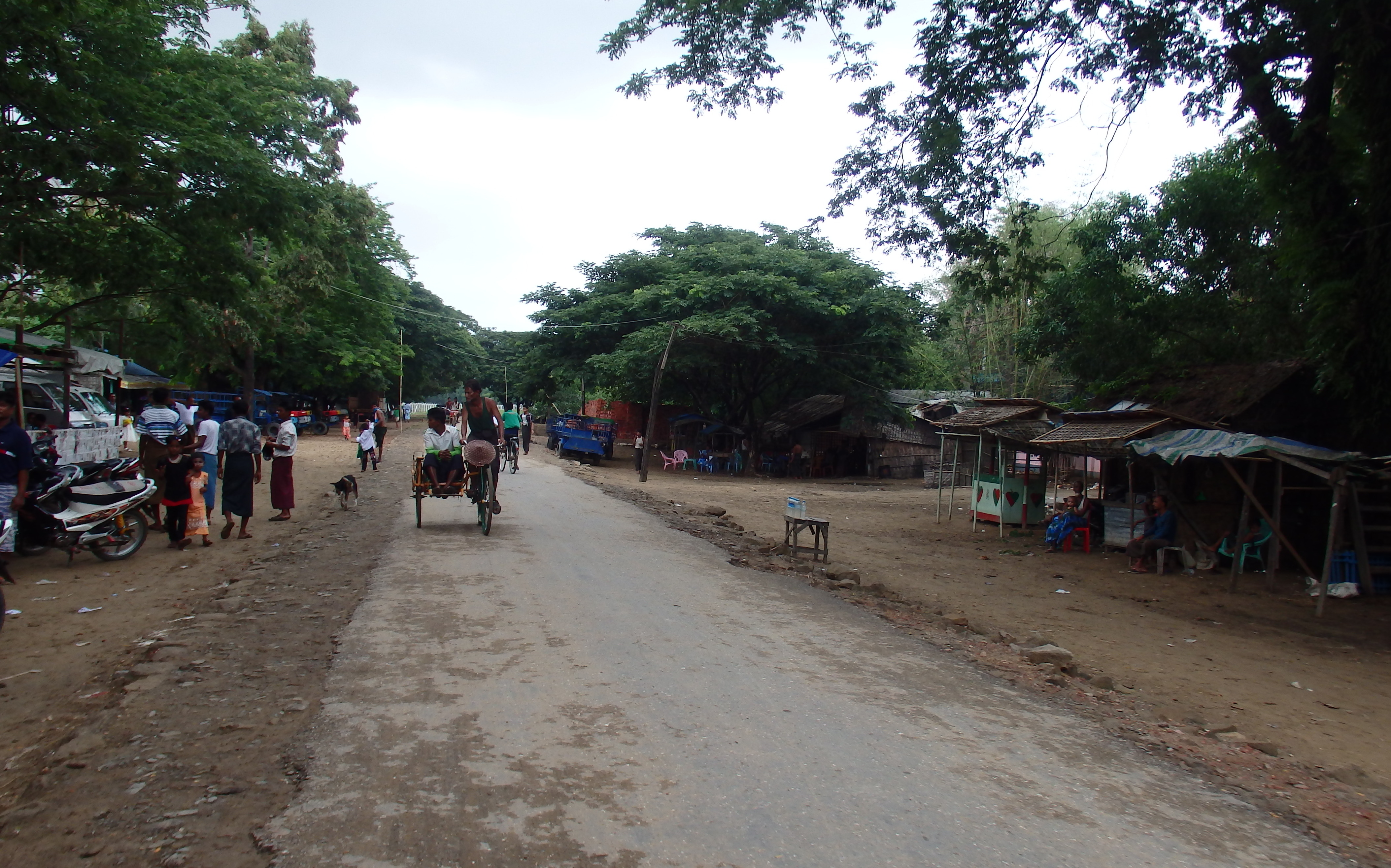 Area